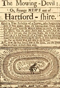 Kornsirkel